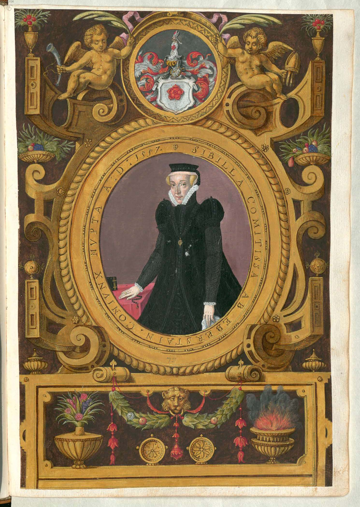 Fuggerorum et Fuggerarum imagines wurde 1588 von Philipp Eduard Fugger beim Kupferstecher Dominicus Custos in Auftrag gegeben. Das Werk enthält mit Aquarell- und Gouache-Farbe kolorierte Stiche der Mitglieder der Fugger von der Lilie. Der Druck von 1618 stellt das einzige kolorierte Exemplar dar. Gräfin Sibylla von Eberstein (1531-1589), Ehefrau des Marx (Markus) Fugger (1529-1597) (1529-1597)